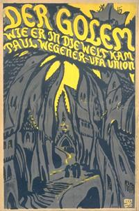 Постер фильма "Голем" (1920)